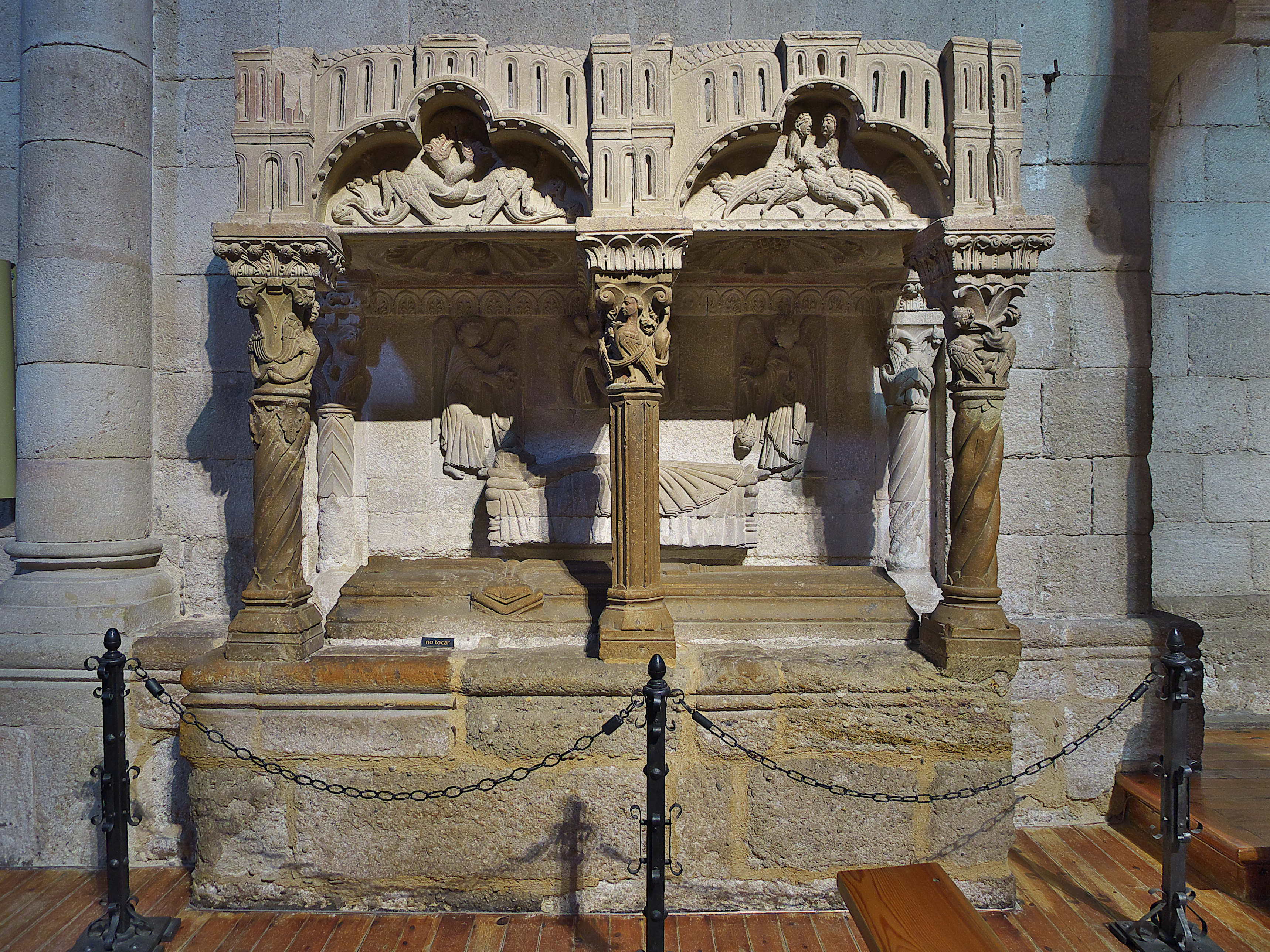 Posiblemente el elemento artístico más valioso del interior de la iglesia, destacado en el arte funerario románico europeo (s. XIII). El esquema compositivo, la perfección de la talla, simbolísmo, empleo del baldaquino, etc. constituyen una joya del románico. Unos ángeles elevan el alma de una importante ¿dama?. Sobre el personaje, se atribuye a la iniciativa de Alfonso IX de León de sepultar en Zamora a su madre, Urraca de Portugal de la Orden de San Juan de Jerusalén.